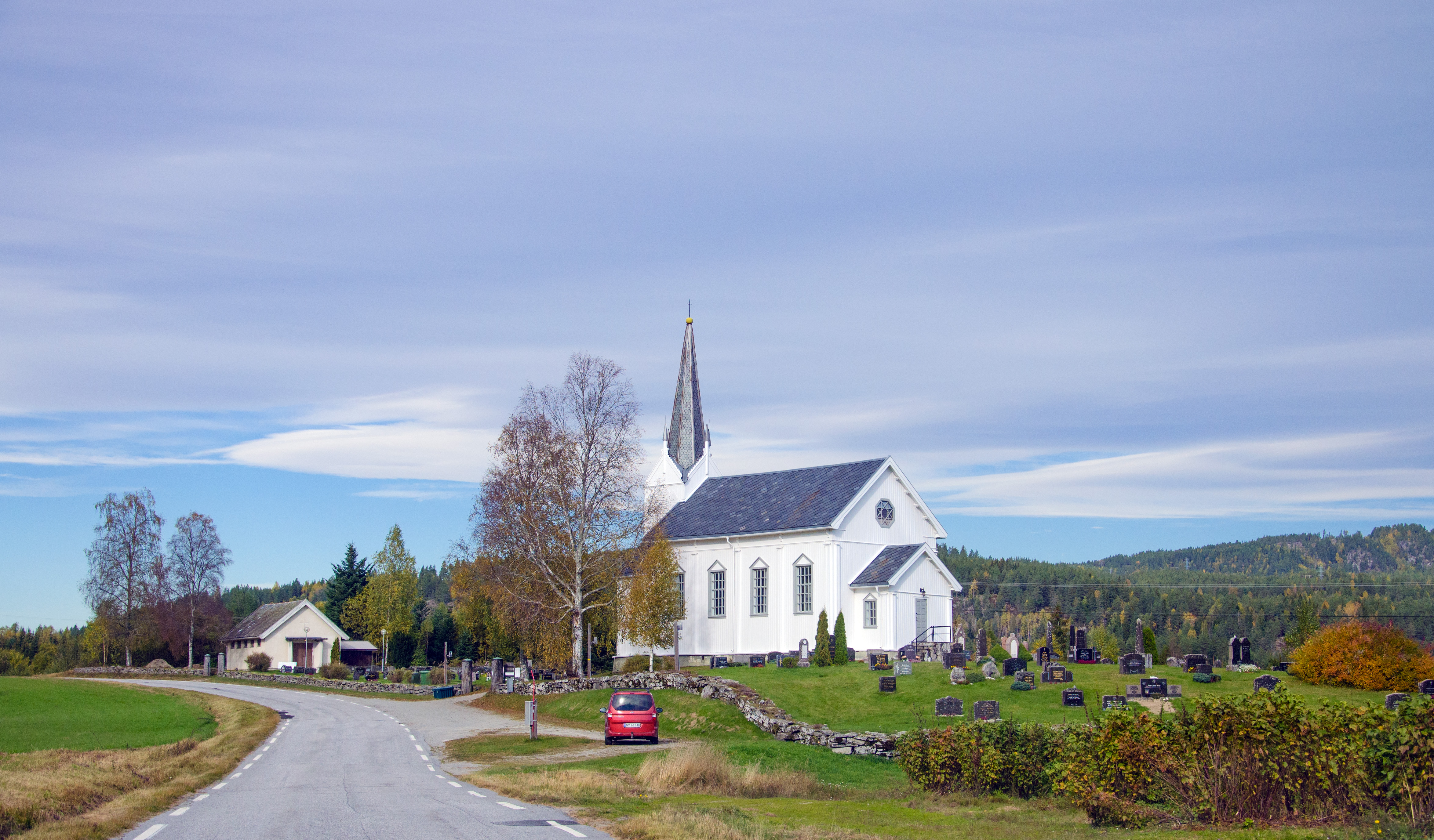 Lisleherad kirke, fra 1873 Fylkesvei 601 Årlifossvegen